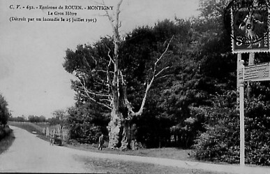 Hêtre remarquable situé dans le village de Montigny en Seine-Maritime